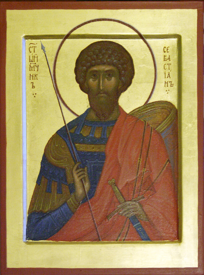 Мученик Севастиан Римский